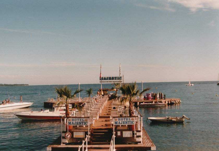 Ponton Hotel Majestic à Cannes Croisette